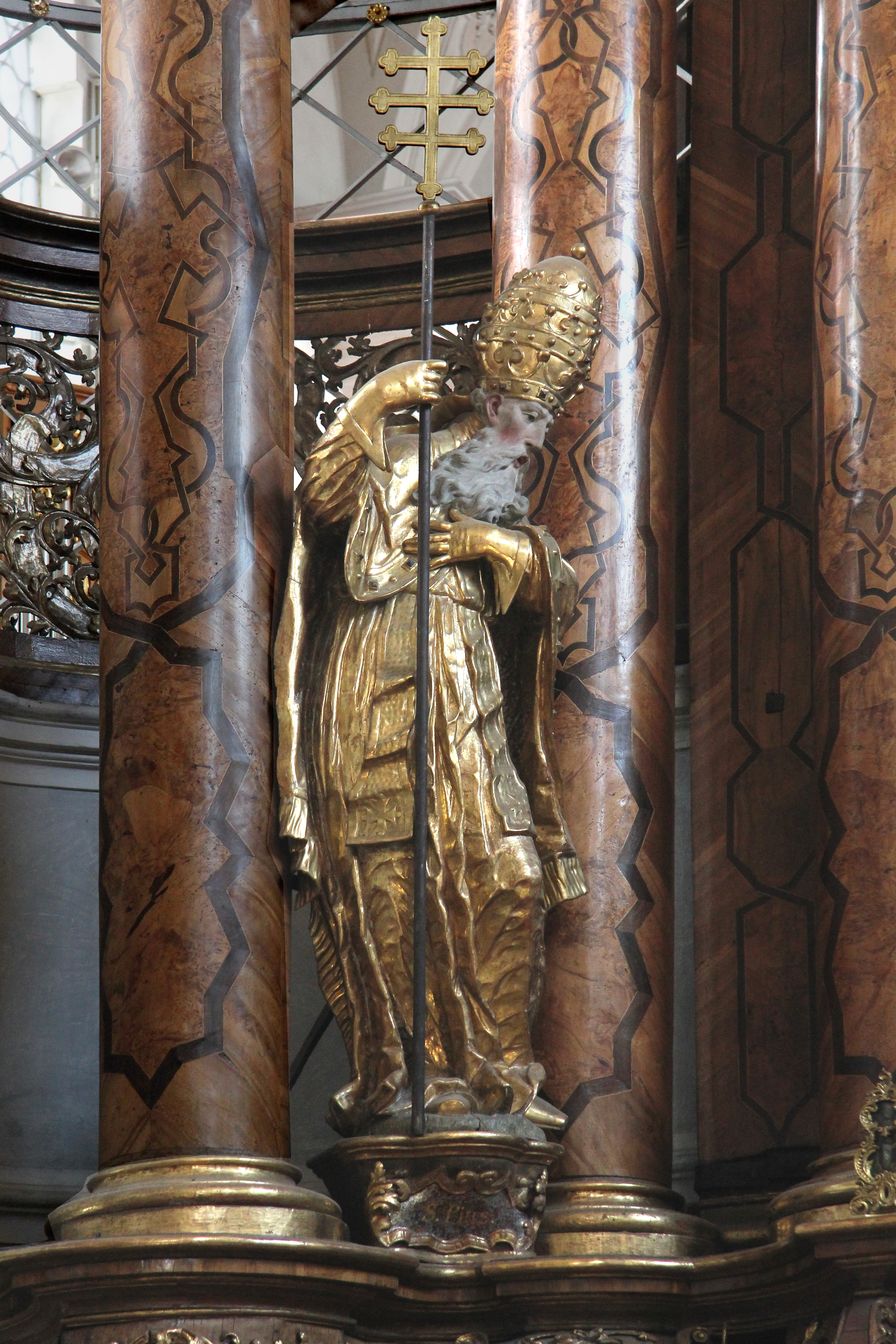 Dominikanerinnenkloster Bad Wörishofen, Statue am Hochaltar: Papst Pius V.